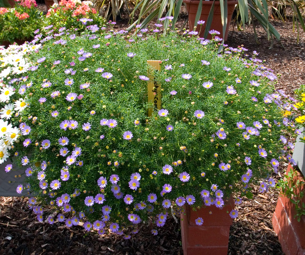 Brachyscome iberidifolia, Blaues Gänseblümchen, Swan River Daisy, Pâquerette bleue